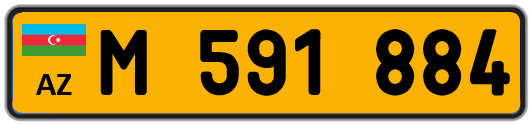 Azərbaycan Respublikası avtomobil dövlət qeydiyyat nişanı - Xarici Vətəndaşlar 2